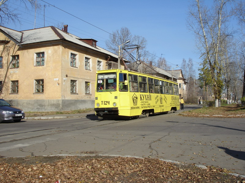 Ангарский КТМ-5 под номером Т-124